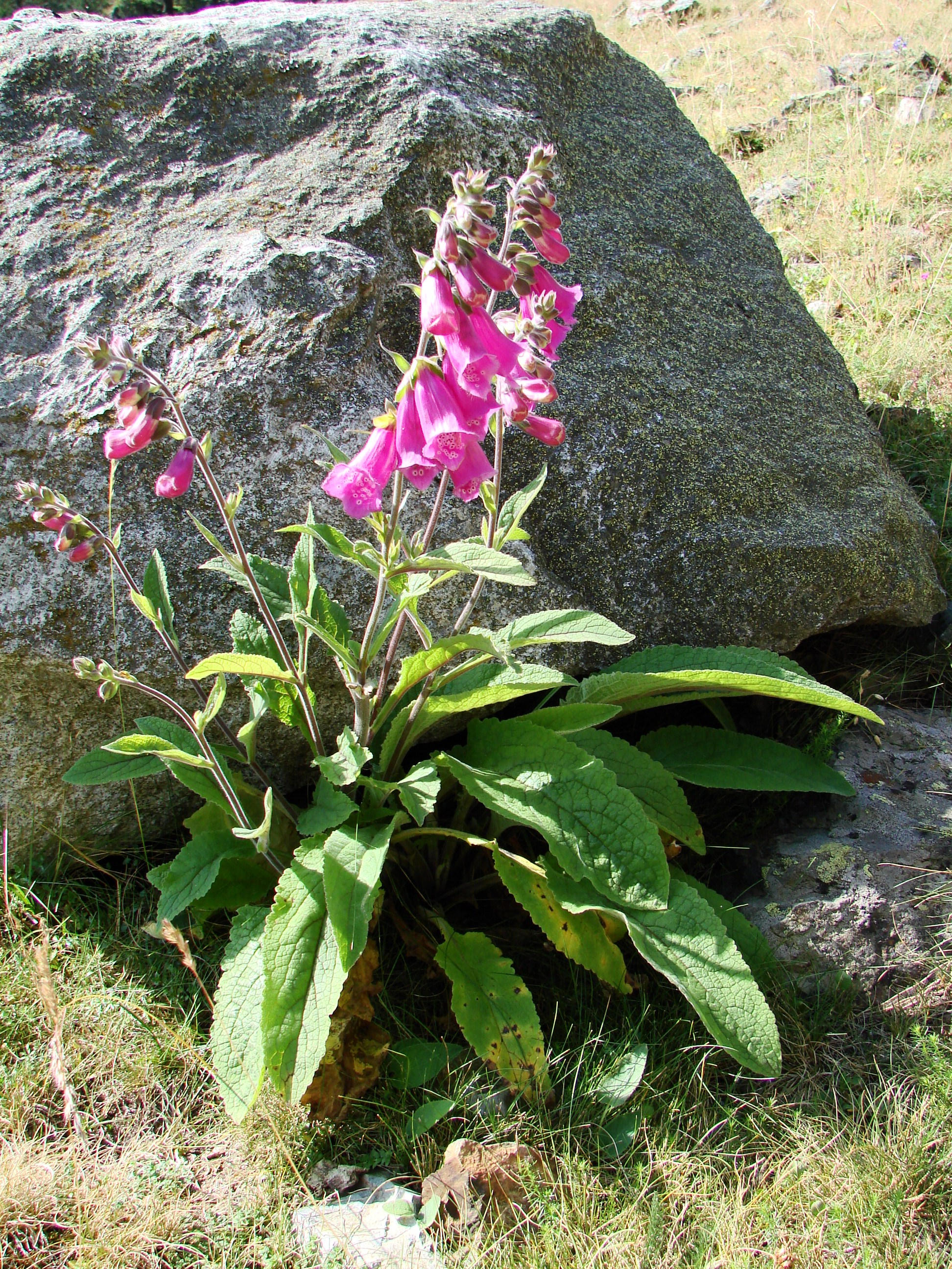 Vallée du Marcadau, Pyrénées françaises, commune de Cauterets, département des Hautes-Pyrénées (France) : Digitalis purpurea